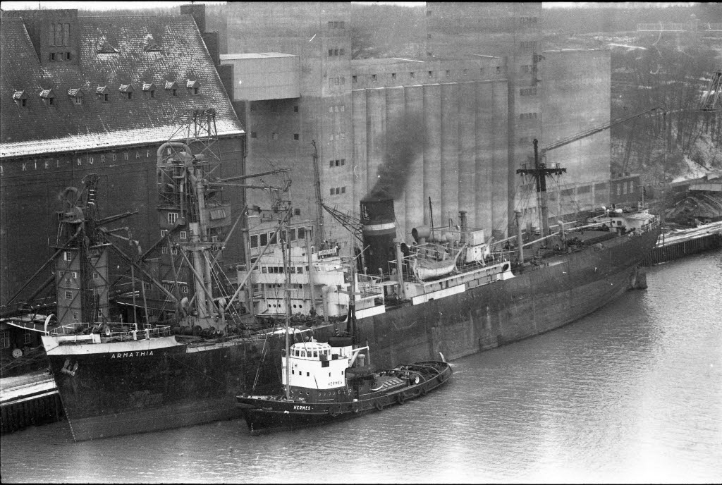 im Nordhafen zum Löschen der in Brand geratenen Weizenladung nach der Strandung vor Fehmarn am 21.02.1964. Im Vordergrund Schlepper HERMES.